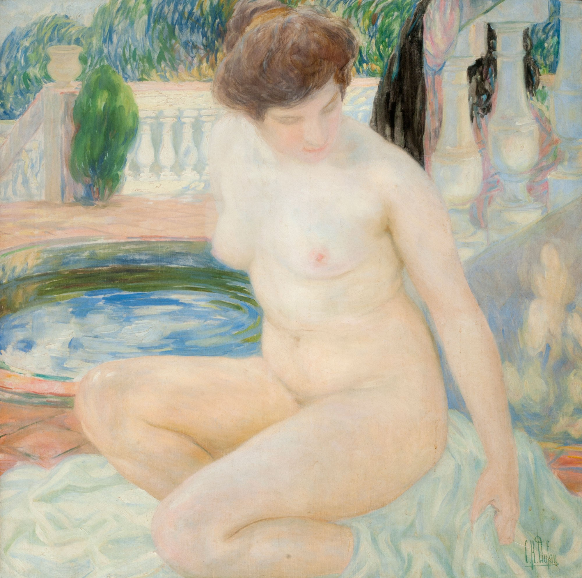 El baño.